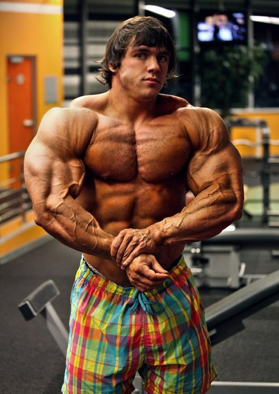 Андрей Скоромный ( HEAD BIREAKER )